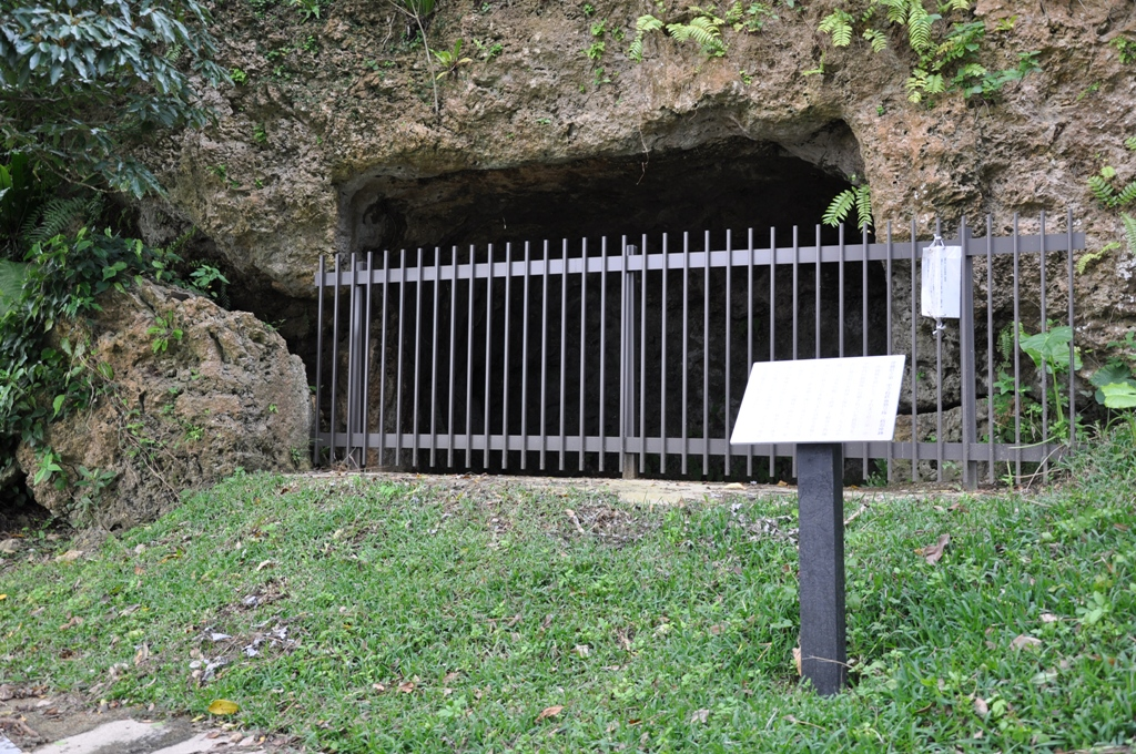 一中生の壕